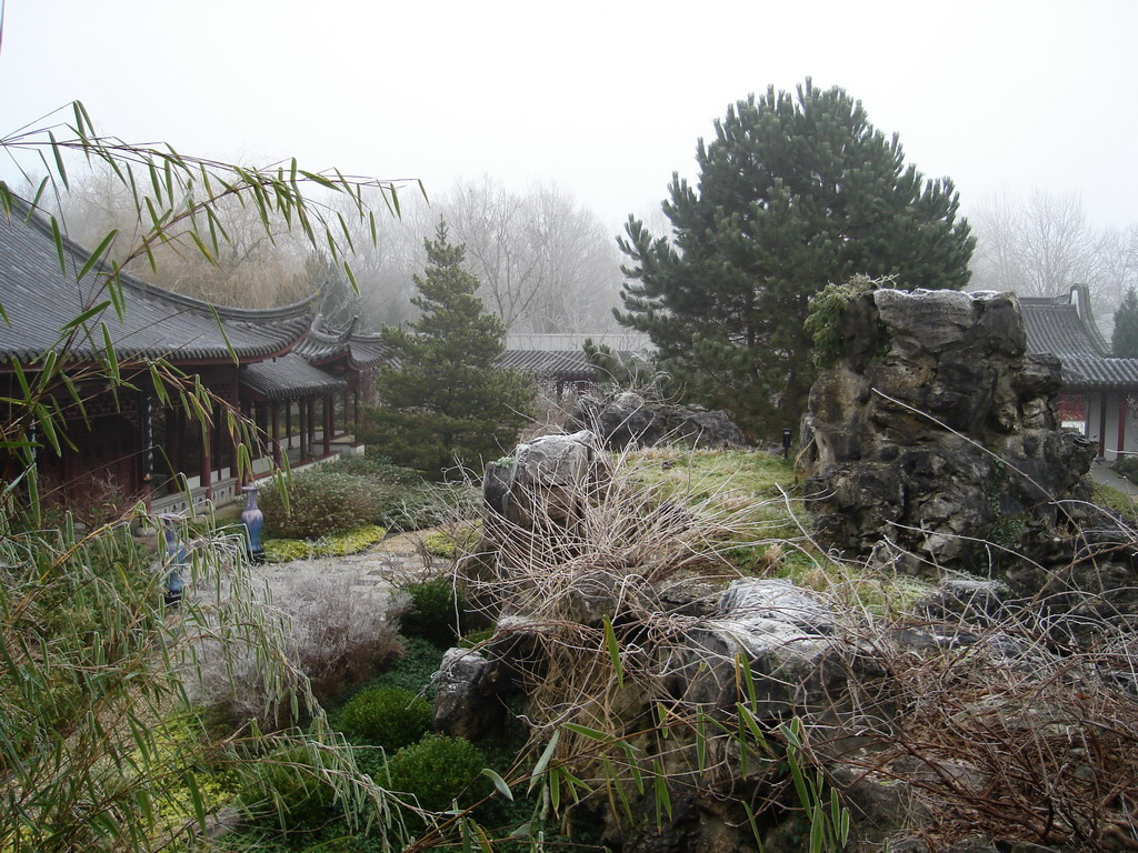 Chinese tuin in Haren